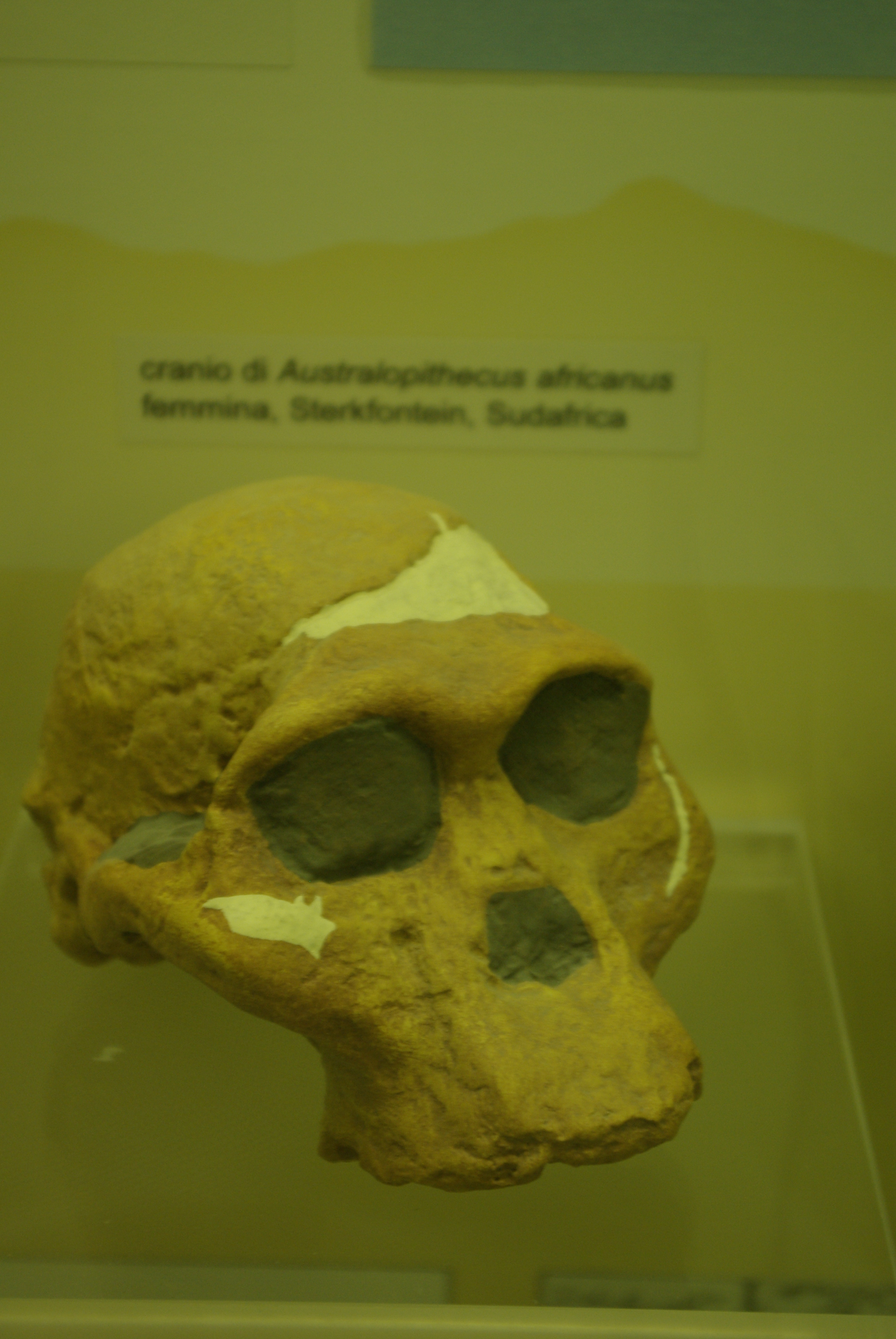 Museo civico di storia naturale This is a photo of a monument which is part of cultural heritage of Italy.